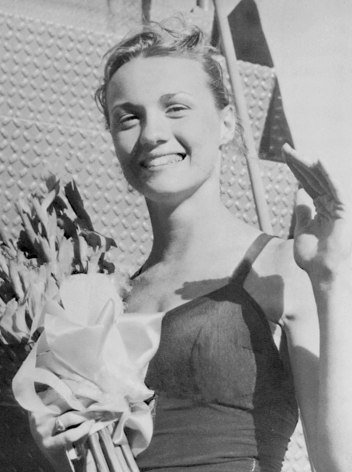 1959 Pretty Swimmer Barbara Gilders Press Photo